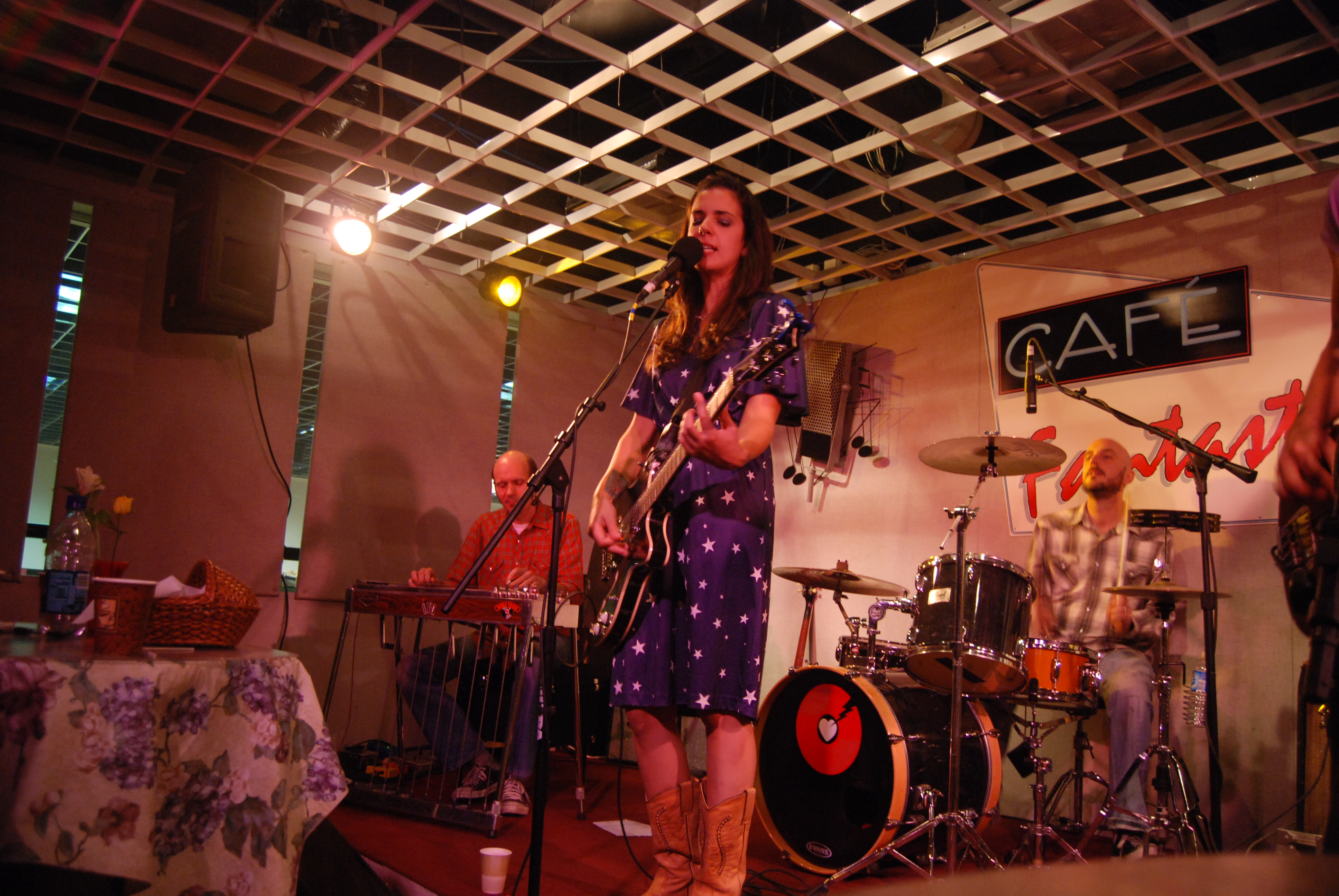 Mike Castellana, Sarah, Rob Dulaney